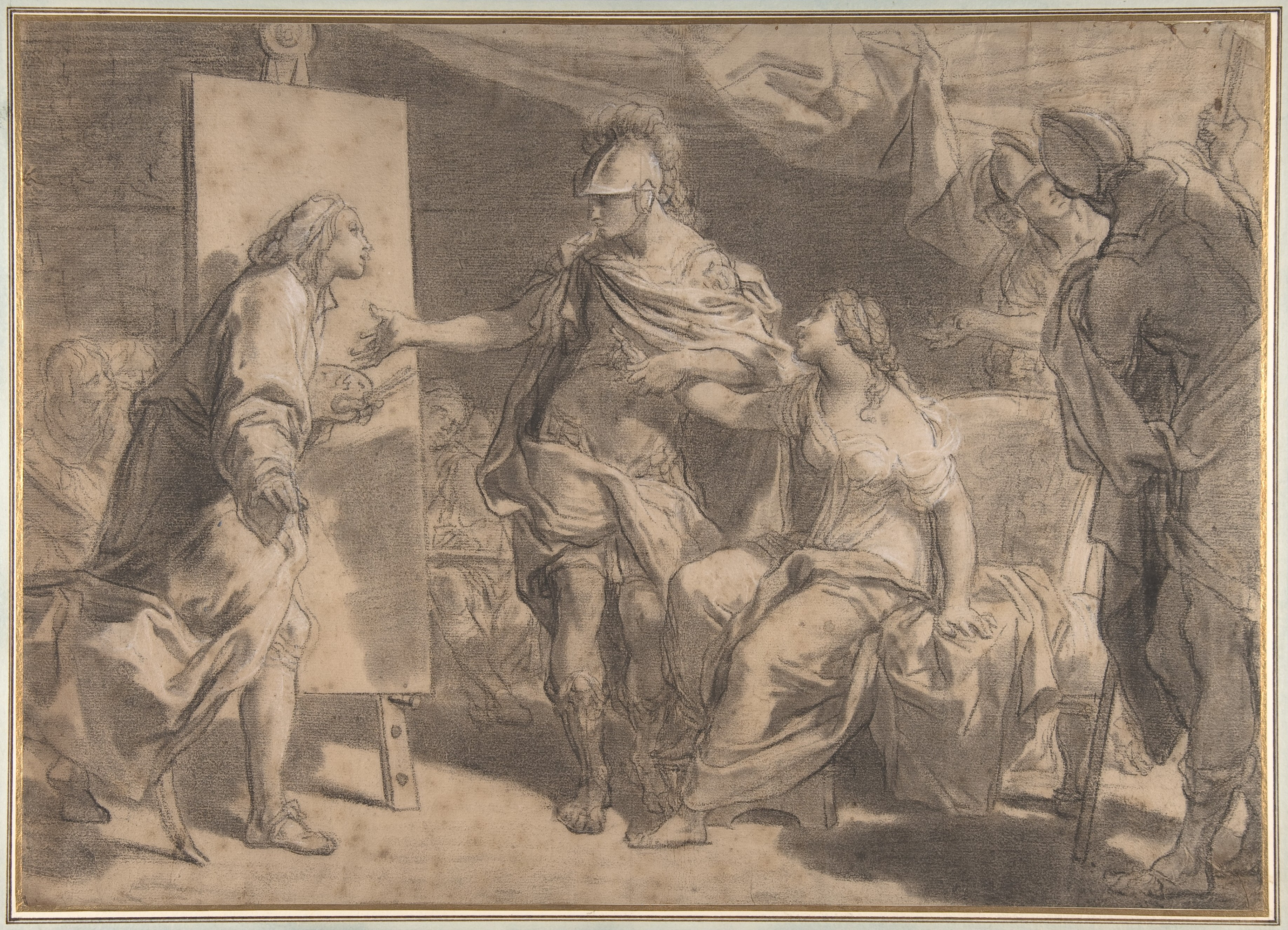 Drawing; Drawings